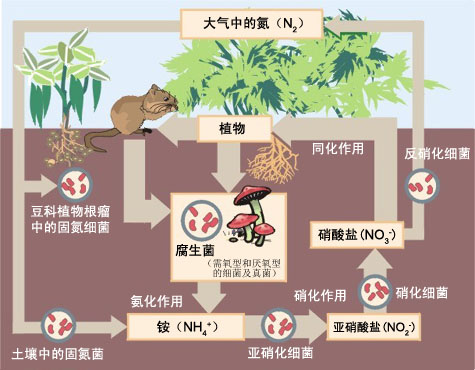 Nitrogen Cycle zh-hans